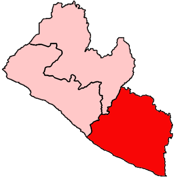 Mappa della diocesi cattolica di Cape Palmas, in Liberia.